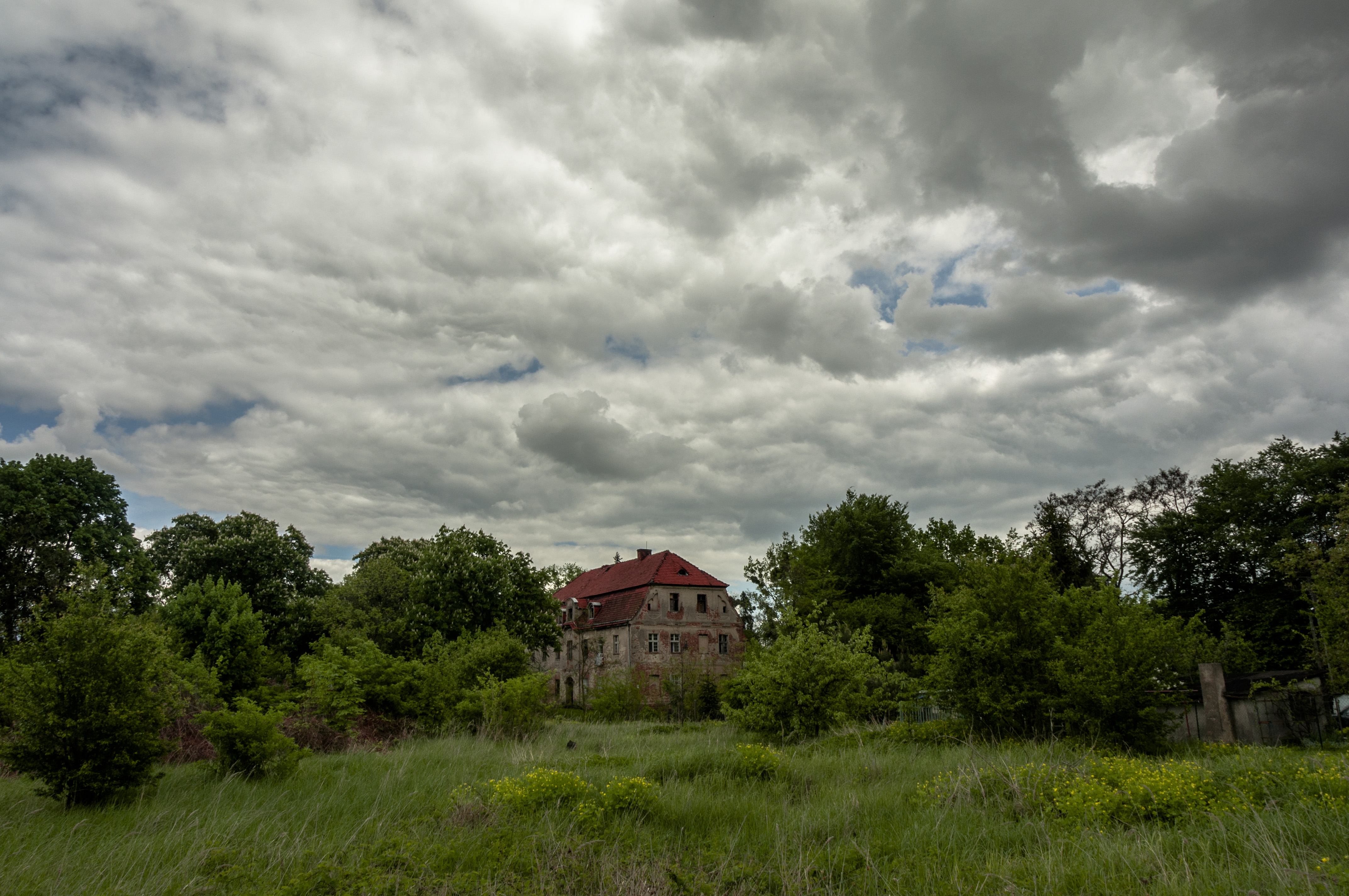 Ciepielowice, dwór, 1800, XX